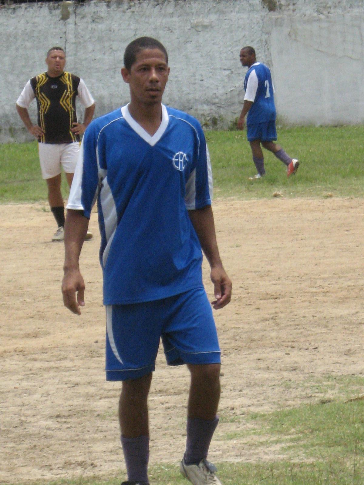 Atleta do Éden Futebol Clube, de São João de Meriti.